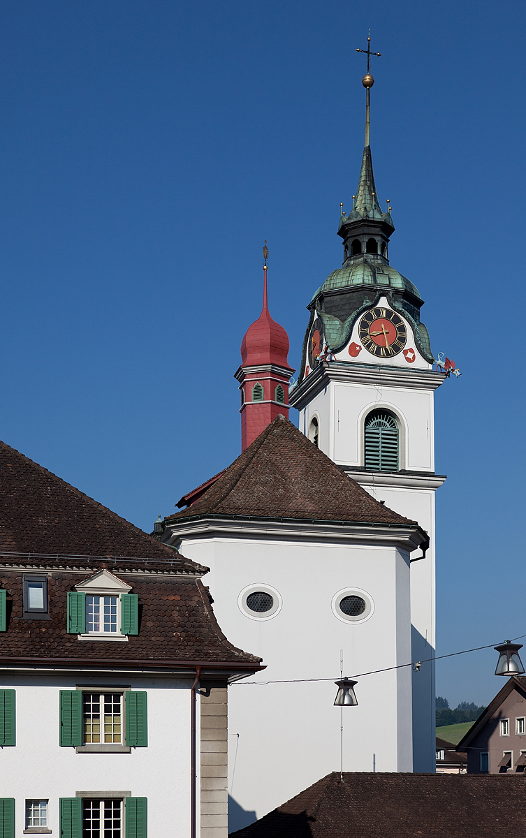 Pfarrkirche St. Peter und Paul in Küssnacht am Rigi (SZ)